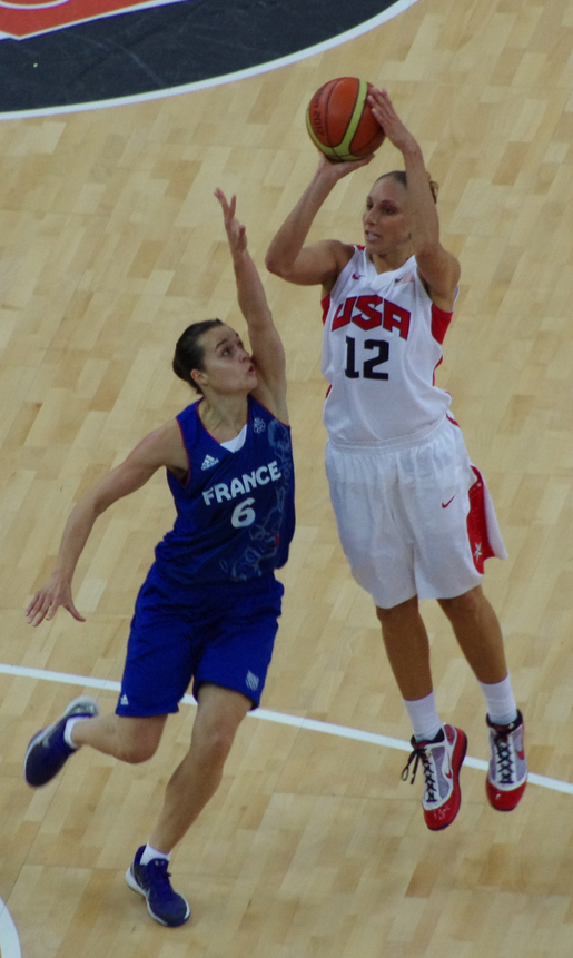 La basketteuse américaine Diana Taurasi tire devant la française Clémence Beikes